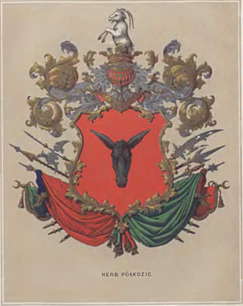 Półkozic z "Herbarz starodawnej szlachty podług Heraldyków polskich z dopełnieniem do czasów obecnych"